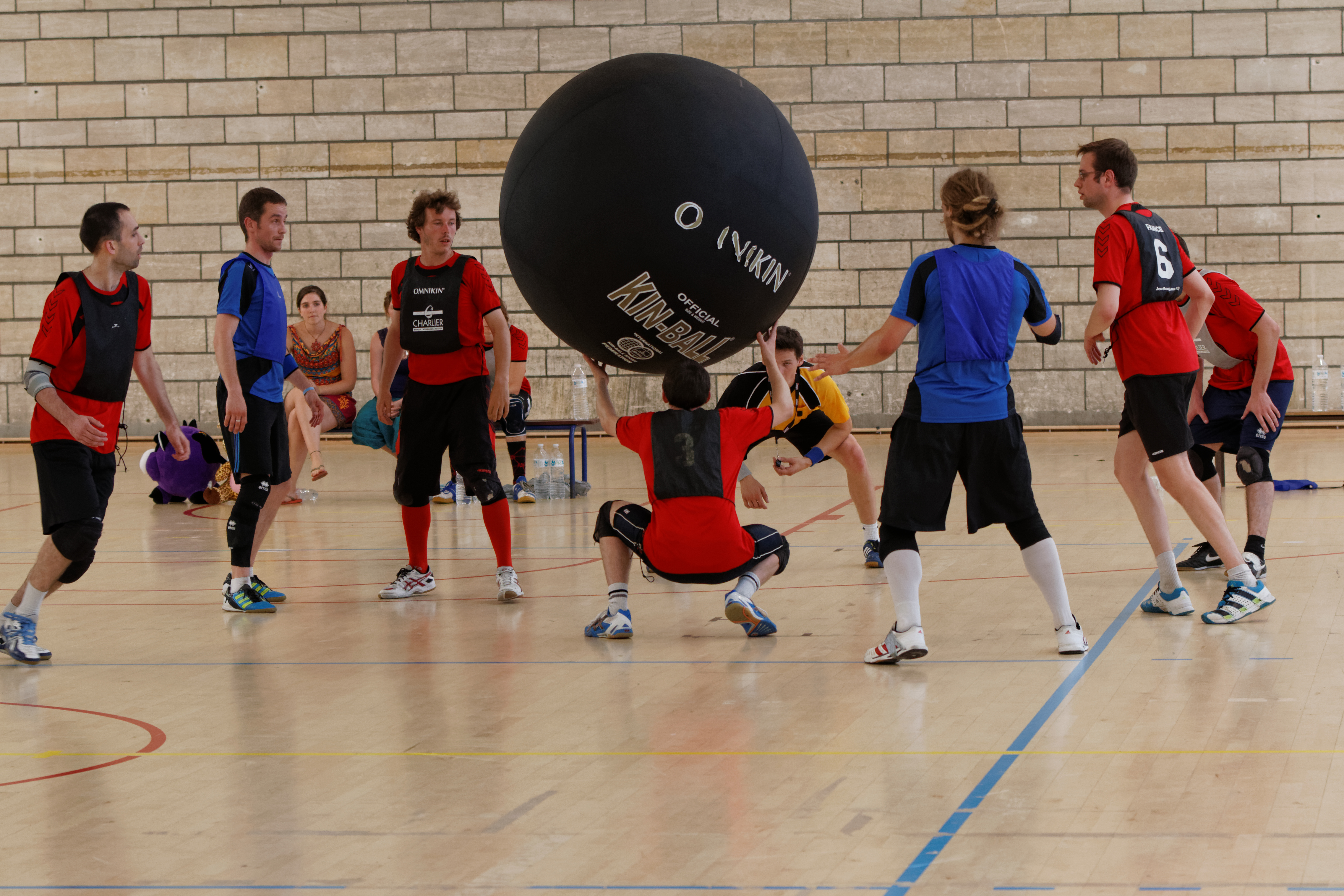 20e journée du championnat de France 2013-2014 de Kin-Ball, 8 juin 2014, Gymnase George Carpentier, Paris.